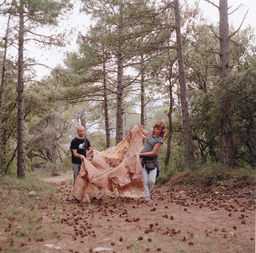 fotografia d'una acció realitzada al bosc, a muntanyes de Prades